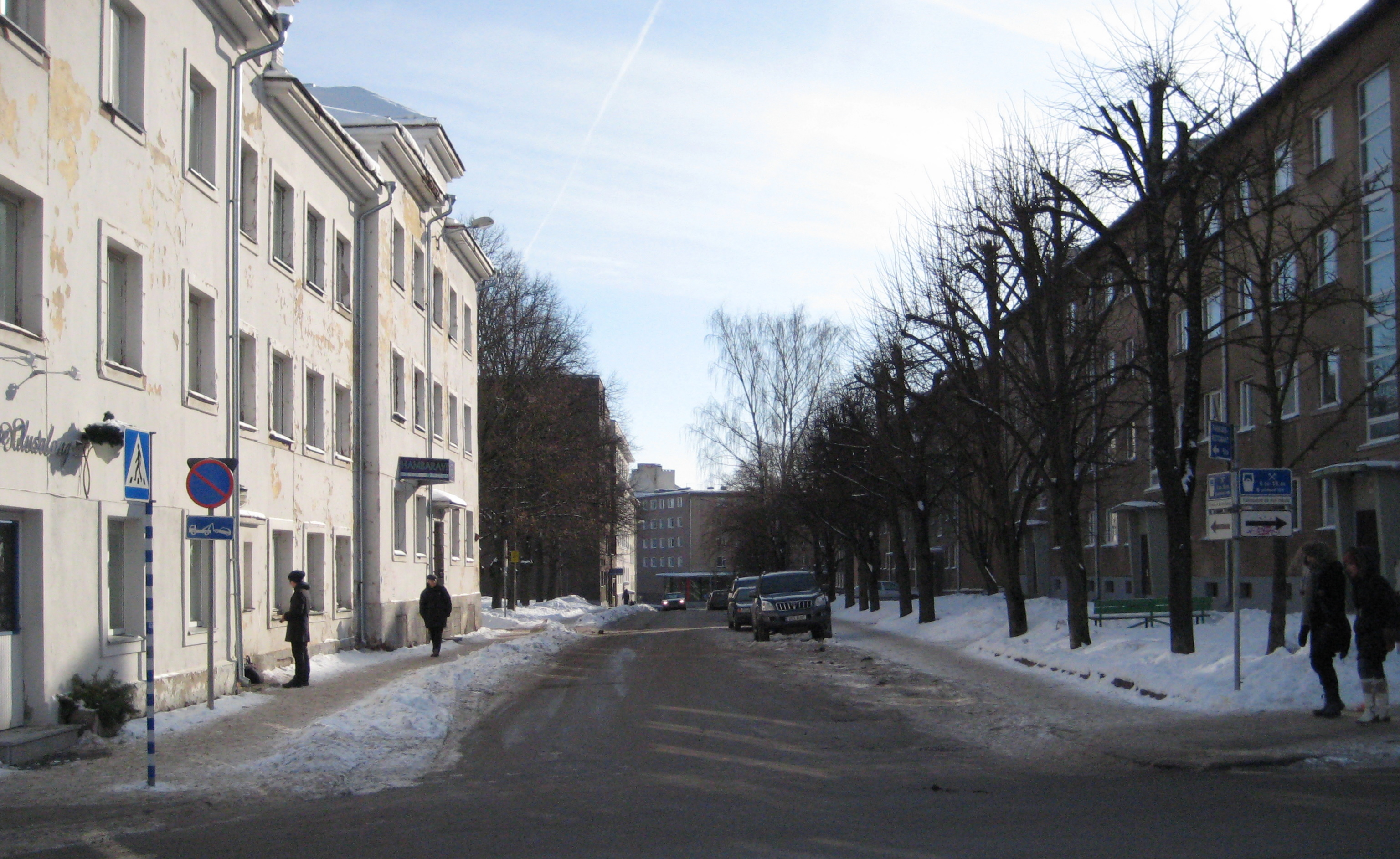 Wilhelm Struve tänav Vanemuise tänava ristmikult